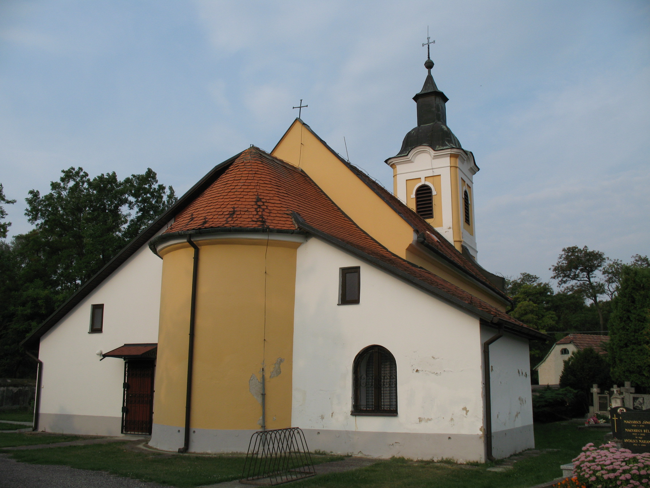 templom hátulról